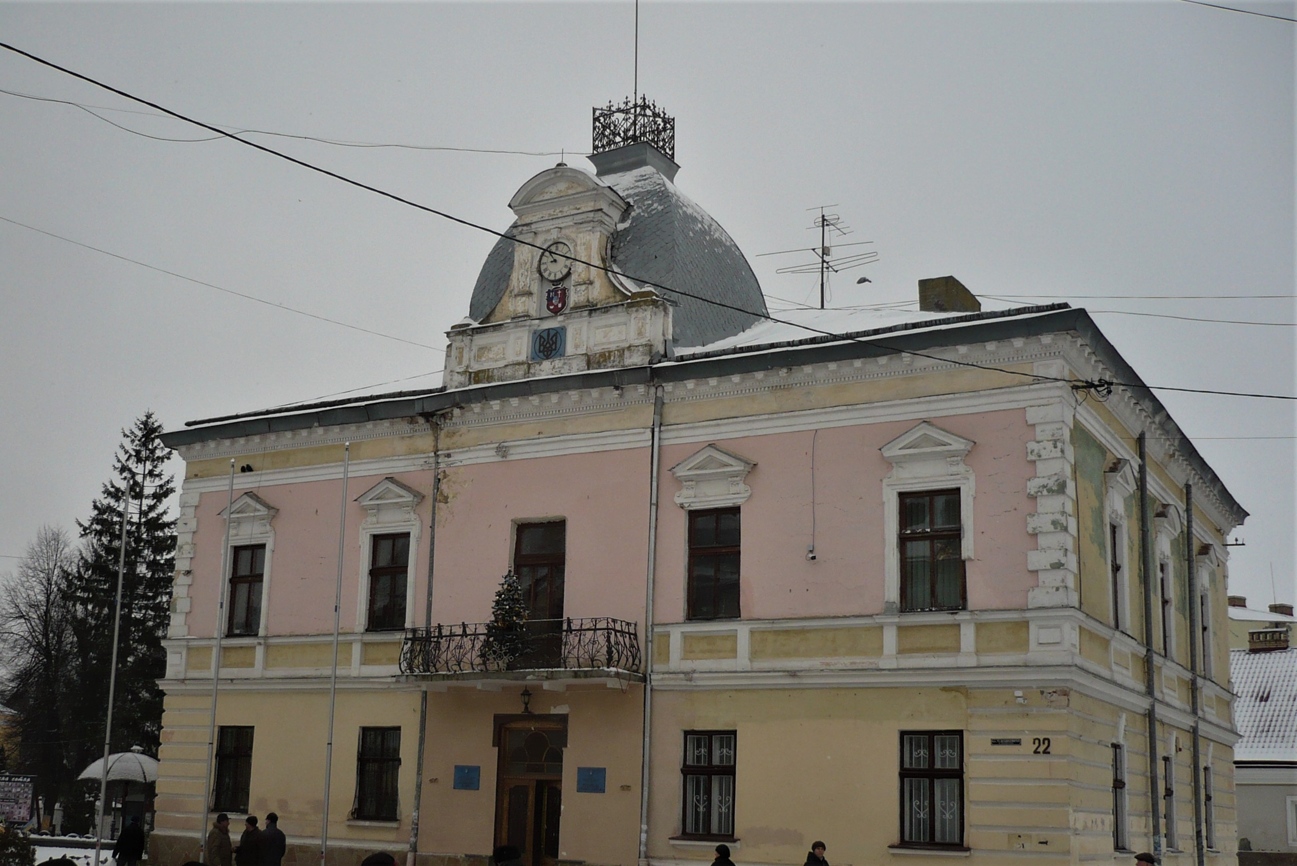 Urząd